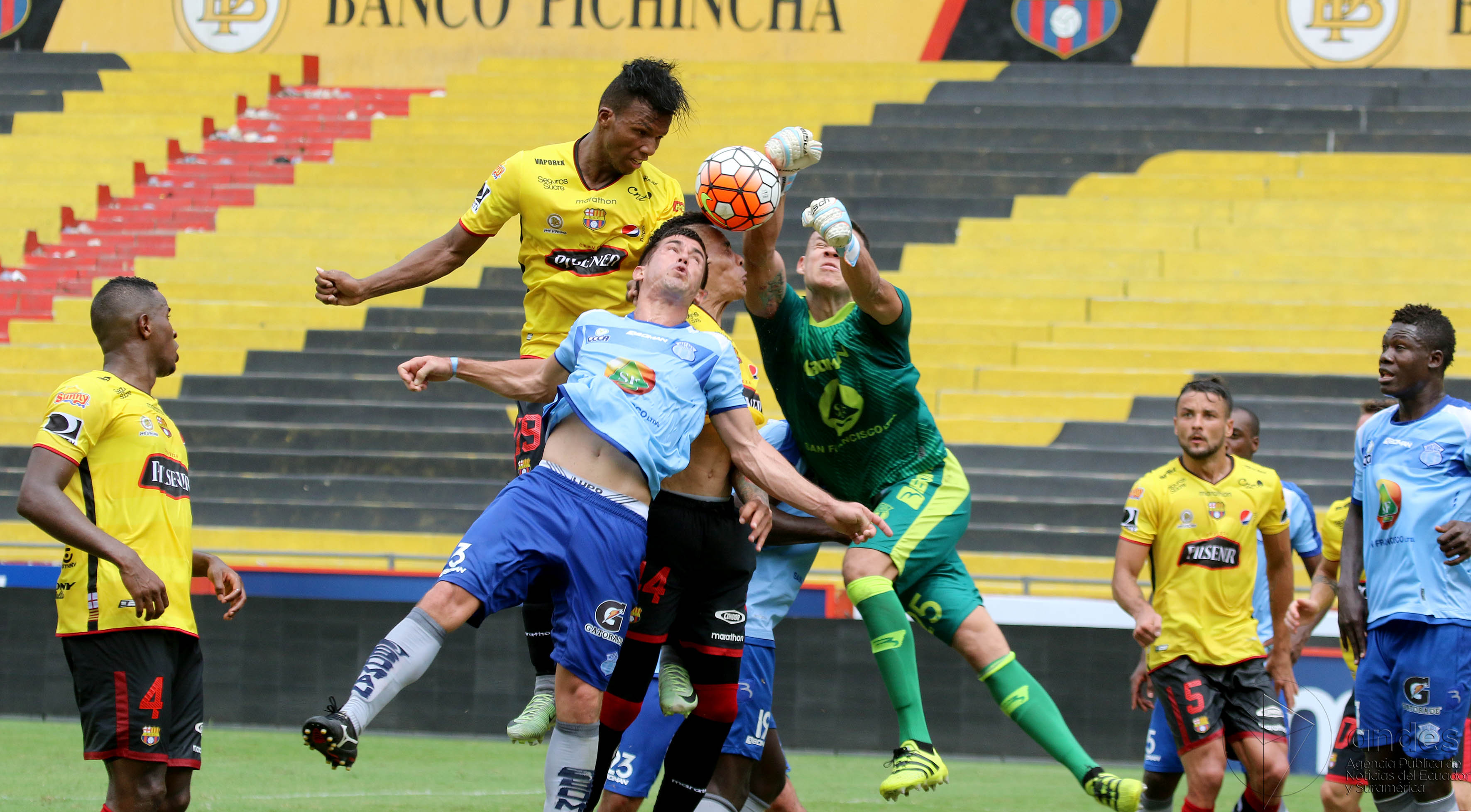 Guayaquil, lunes 06 de febrero del 2017 (Andes).-Barcelona enfrenta al Macará en partido de la segunda fecha del campeonato ecuatoriano de fútbol Foto:Andes/César Muñoz